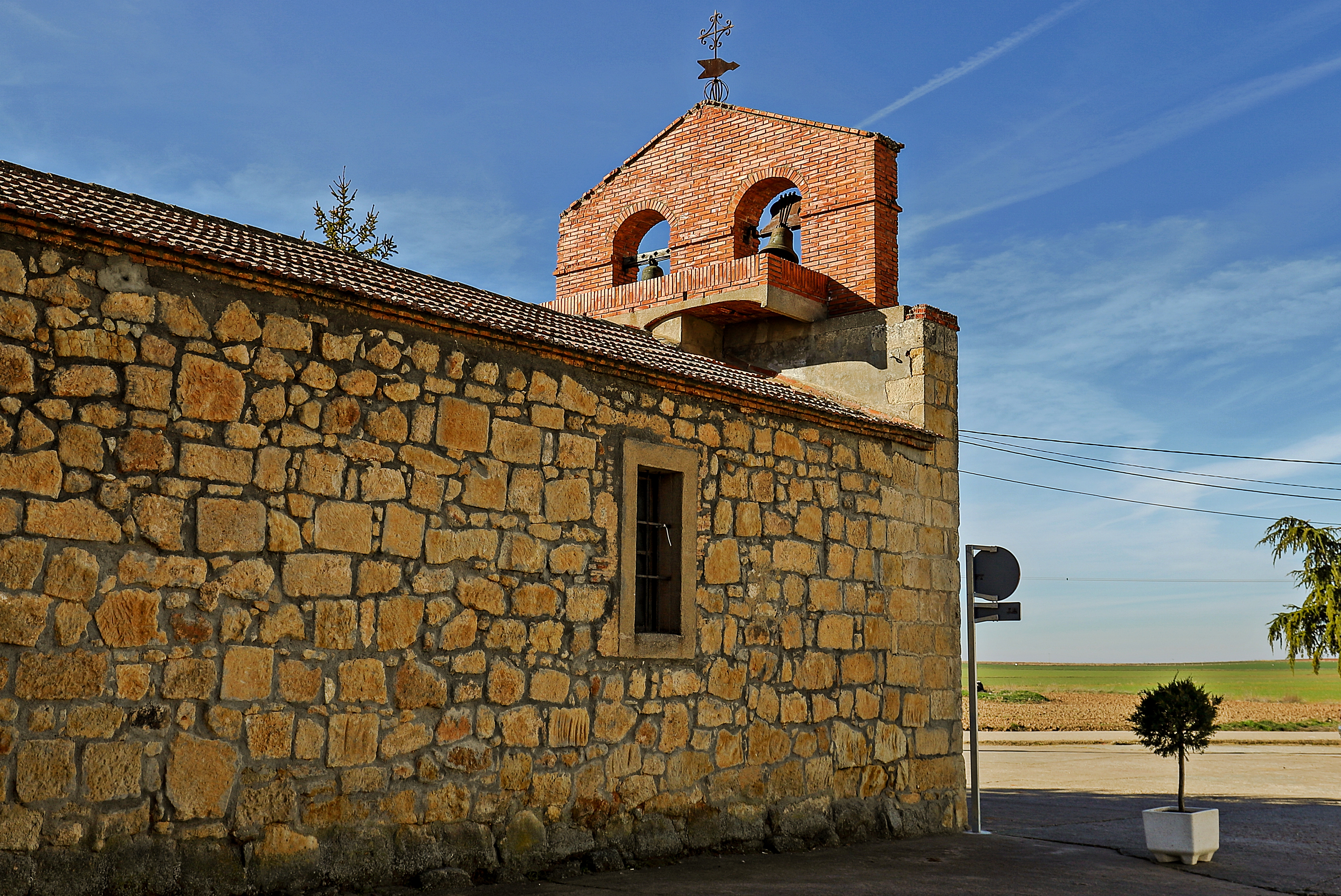 Galindo y Perahuy municipio de la comarca Campo de Salamanca, provincia de Salamanca.